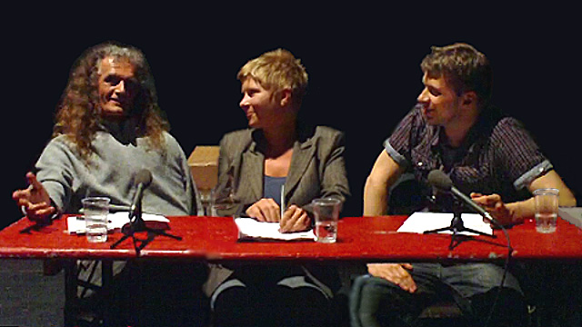 Martin Reiter (Tacheles e.V.), Nadia Panknin und Hartmut Lühr im Berliner "Kunsthaus Tacheles" während der Podiumsdiskussion "Kann politisch korrekte Kunst uns vor zu viel Freiheit schützen ?", 21.07.2010